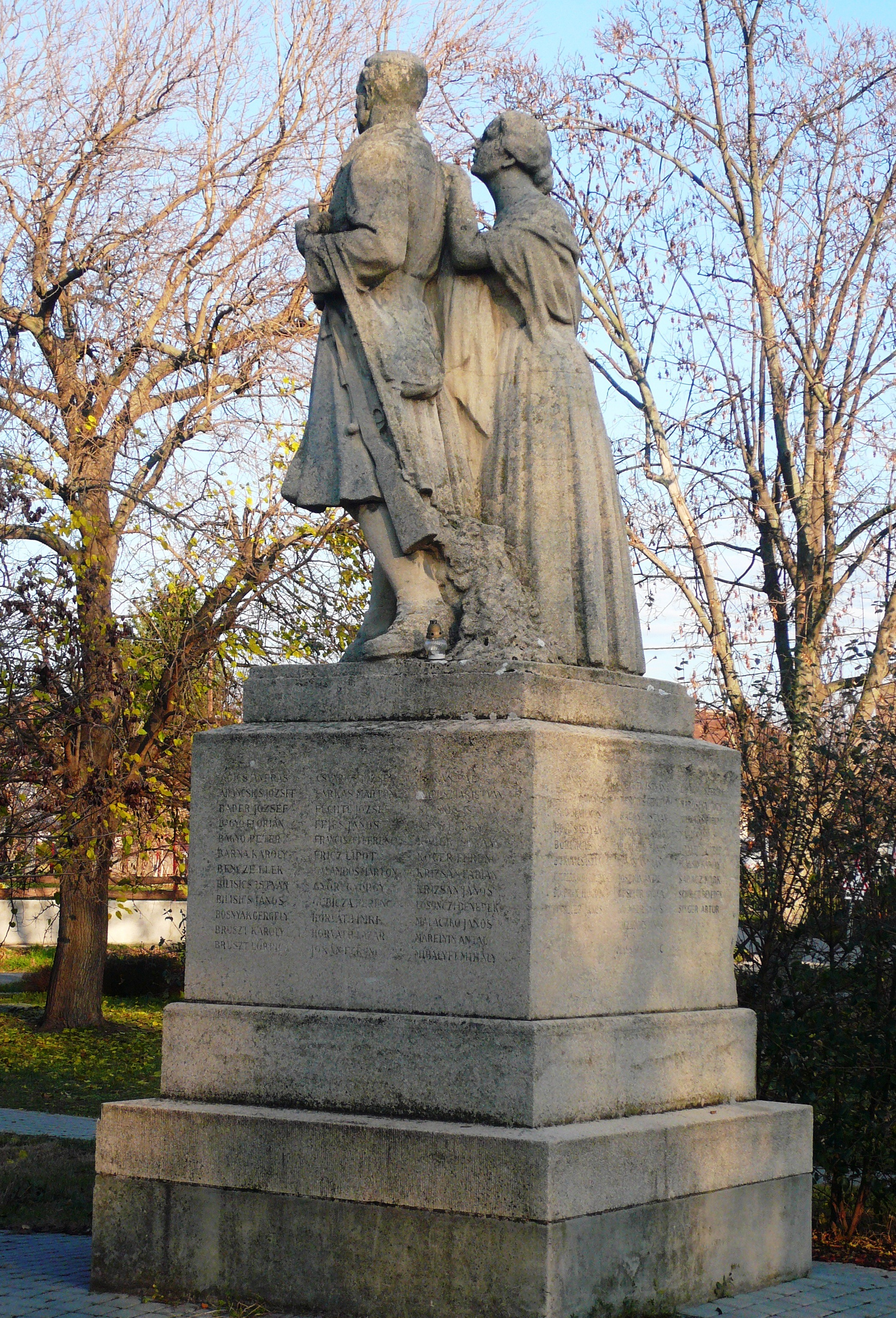 Tököl. I. világháborús emlékmű (Nemessányi Andor, 1930). A hitvesétől búcsúzó, frontra induló katona, posztamensén az elesett hősök nevei. - Magyarország, Pest megye, Tököl, Hősök tere